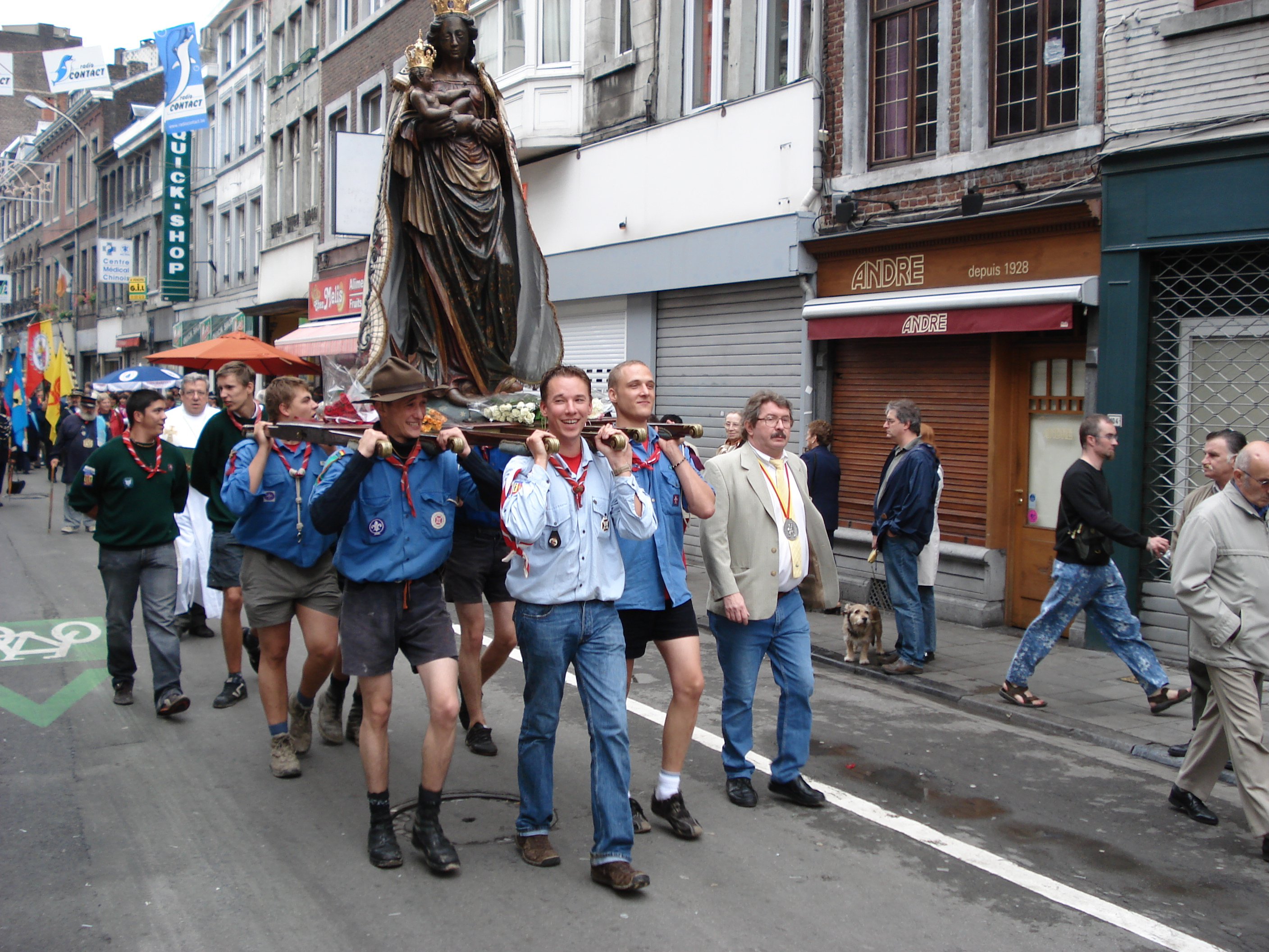 Procession de la Vierge Noire, le 15 août 2006, portée par les scouts de l'unité Notre Dame d'Outremeuse, 5ème OM.